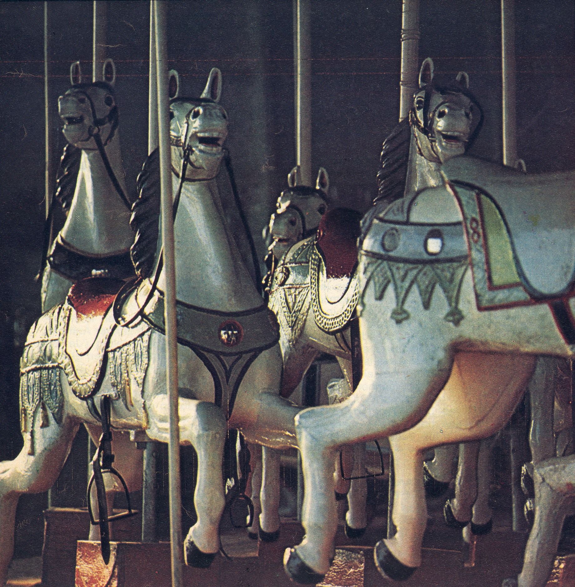 Carousel/Carrousel (paardenmolen) in Bobbejaanland theme park, Belgium (60s-80s)